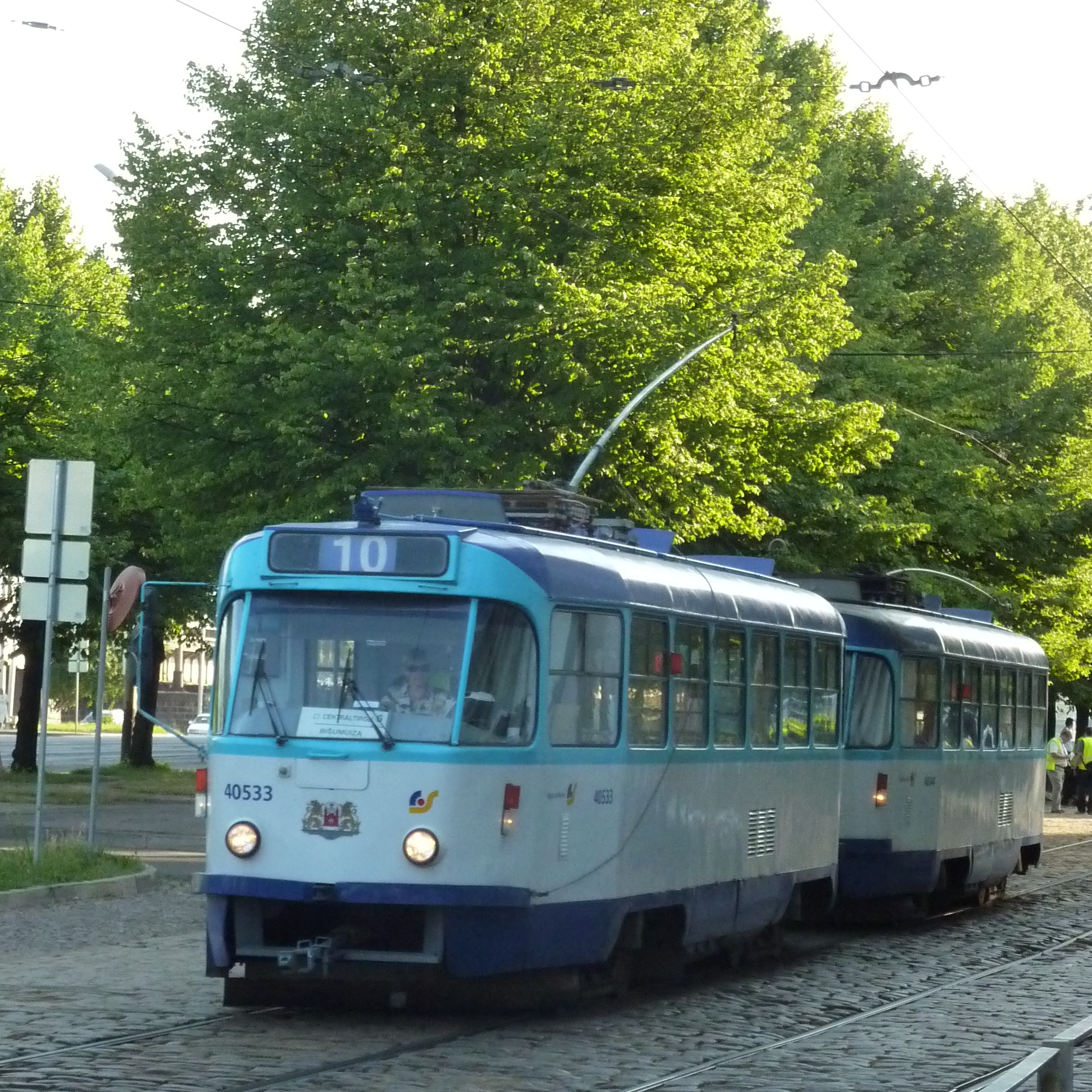 Tramwaj Tatra T3 w Rydze